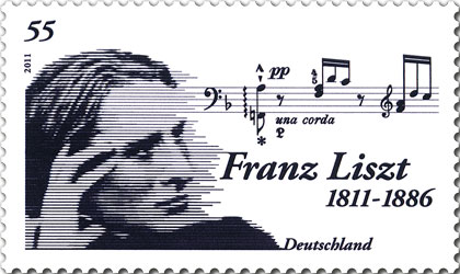 Stamp description / Briefmarkenbeschreibung